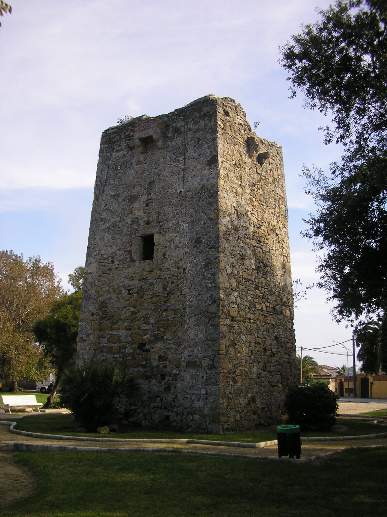 Torre de Entrerríos, también llamada Torre de Entre Ríos, Torre de Palmones o Torre de Guadarranque, en la localidad de Los Barrios, Andalucía España.